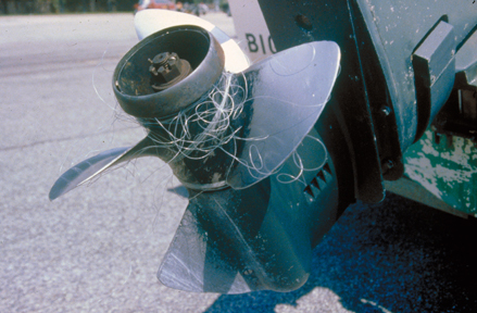 Marine debris tangles a propeller